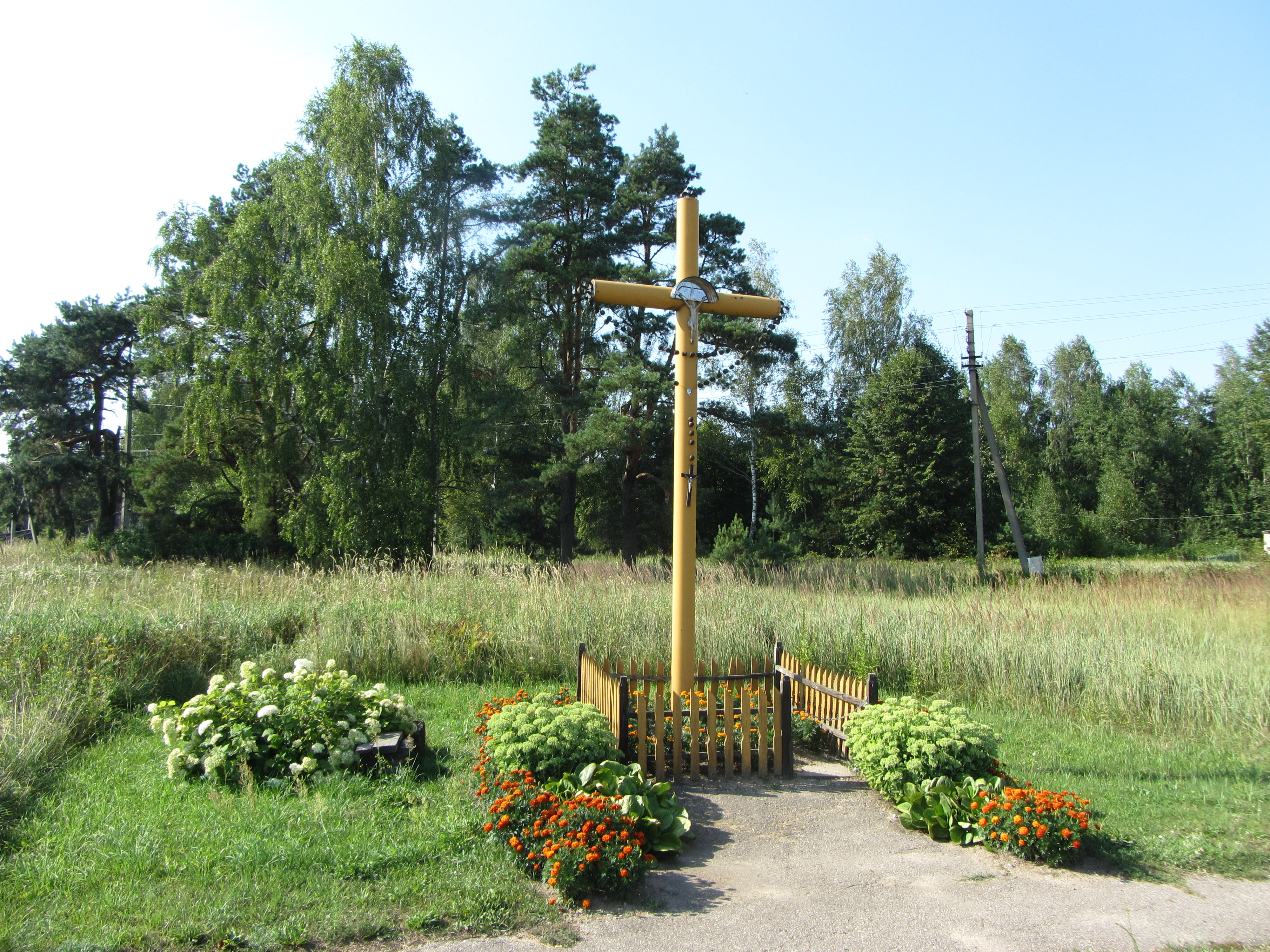 Tartokas 17127, Lithuania